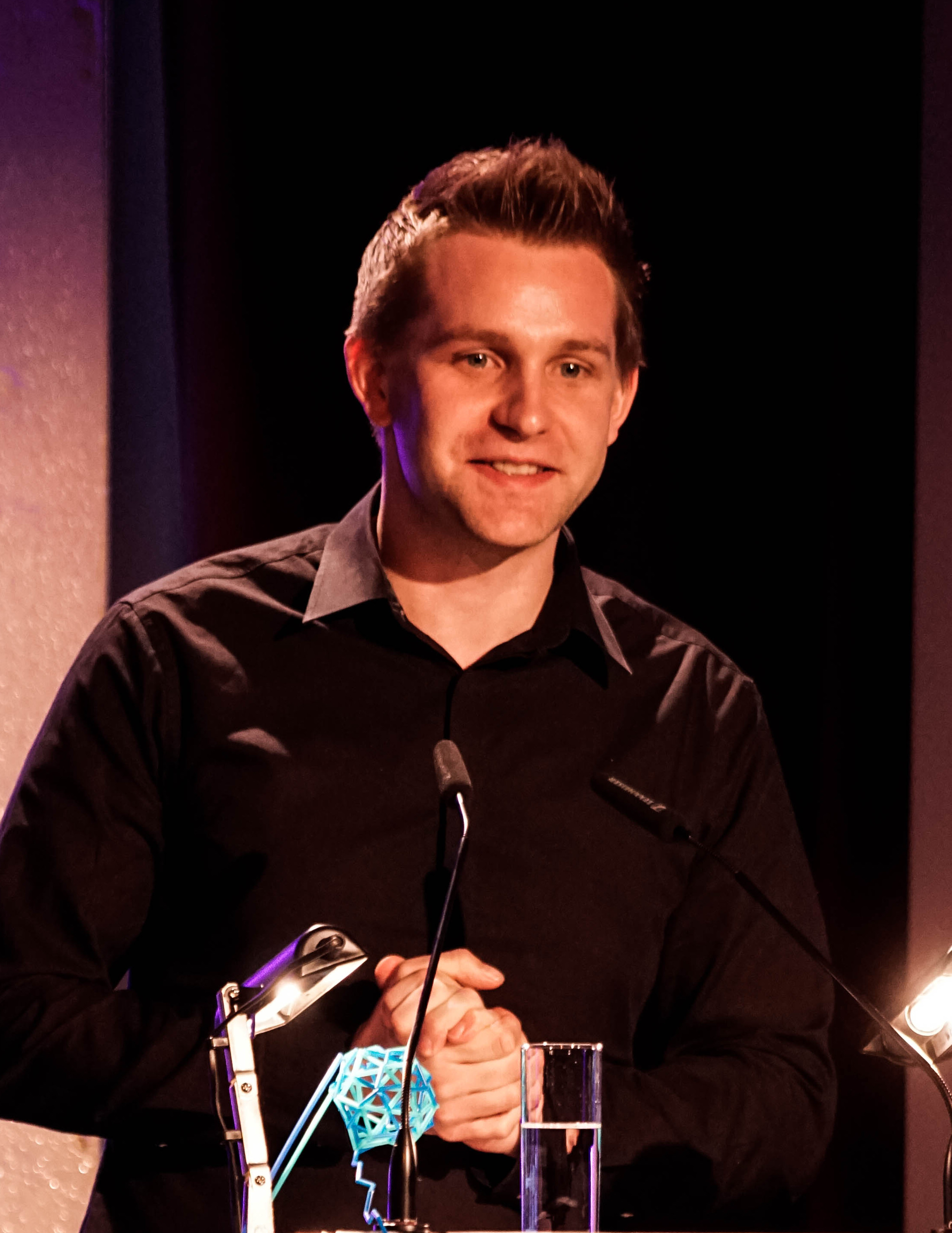 Bei den Big Brother Awards 2015 von Digitalcourage e.V. in Bielefeld.